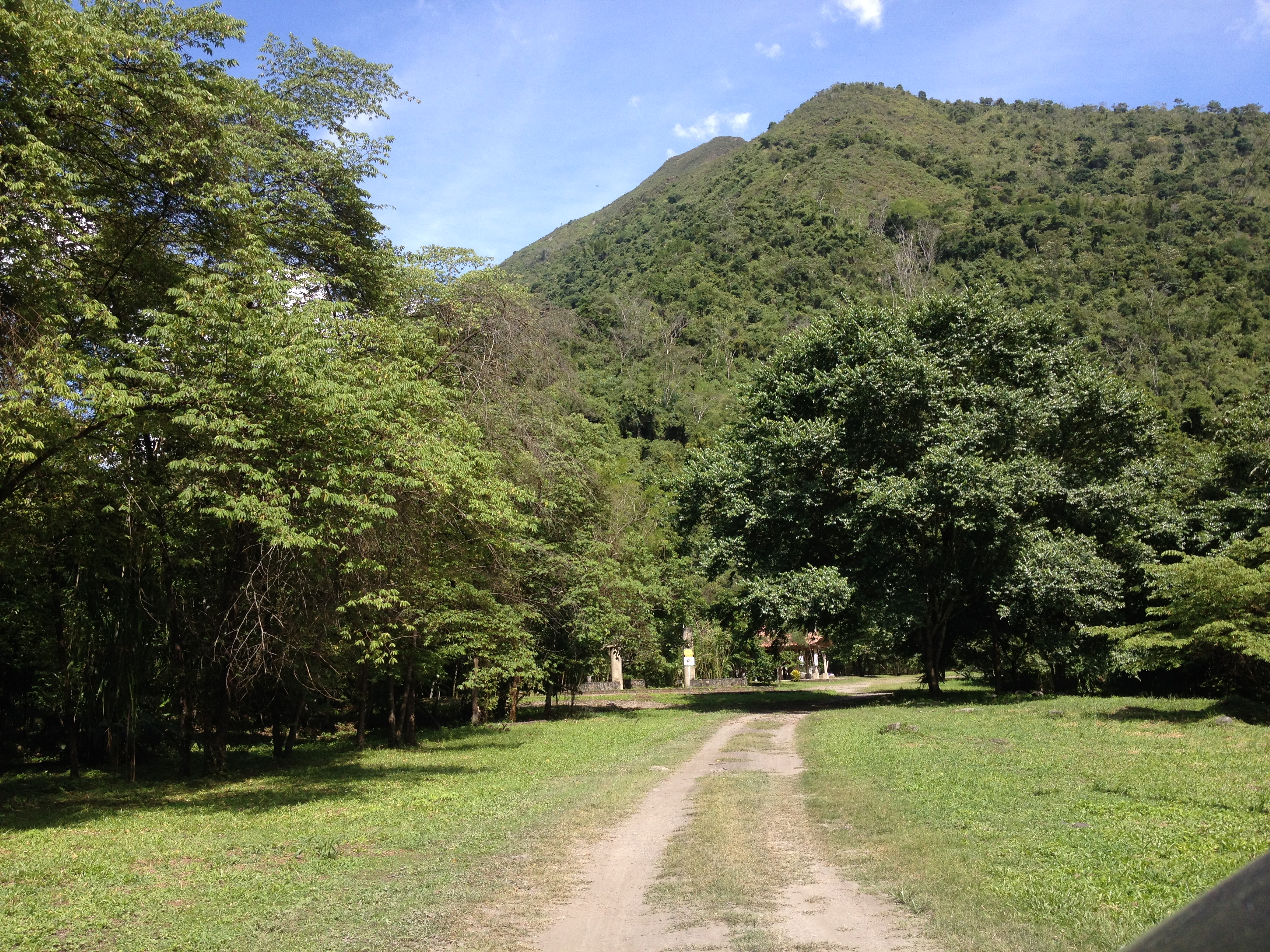 Mirando al Cerro de Santa Teresa Esta fotografía fue tomada en el municipio colombiano con código 25489.